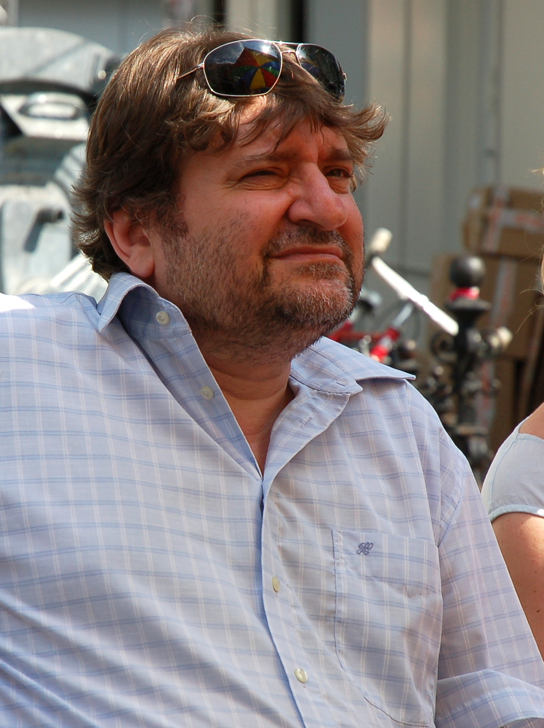 Bozóki András a 2012-es ünnepi könyvhéten.